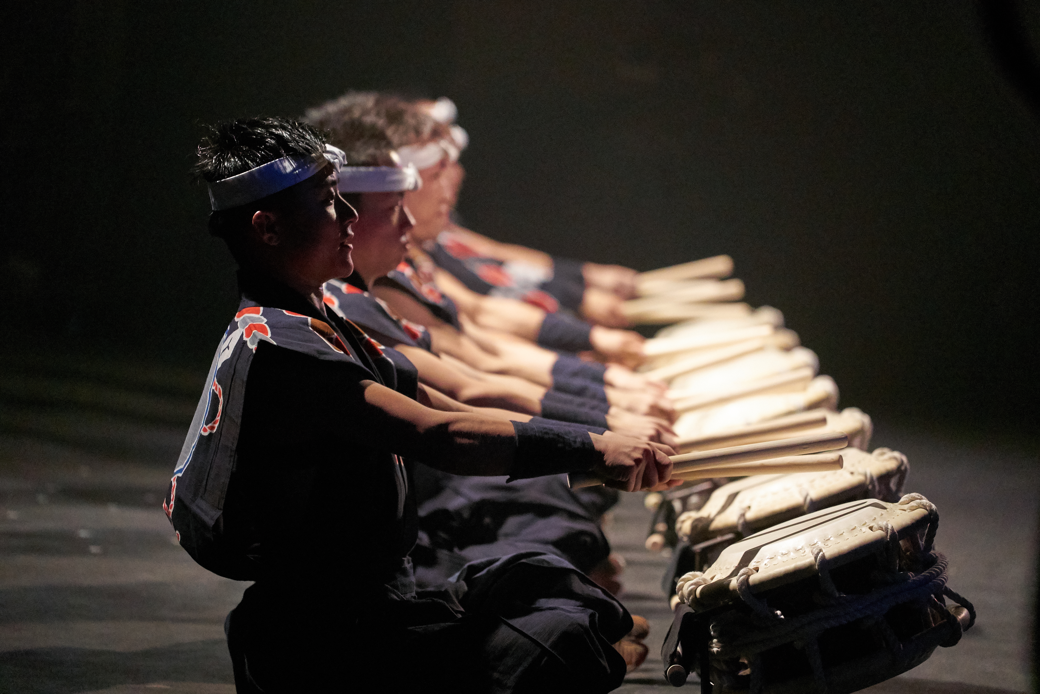 神馬 志多らの公演にて